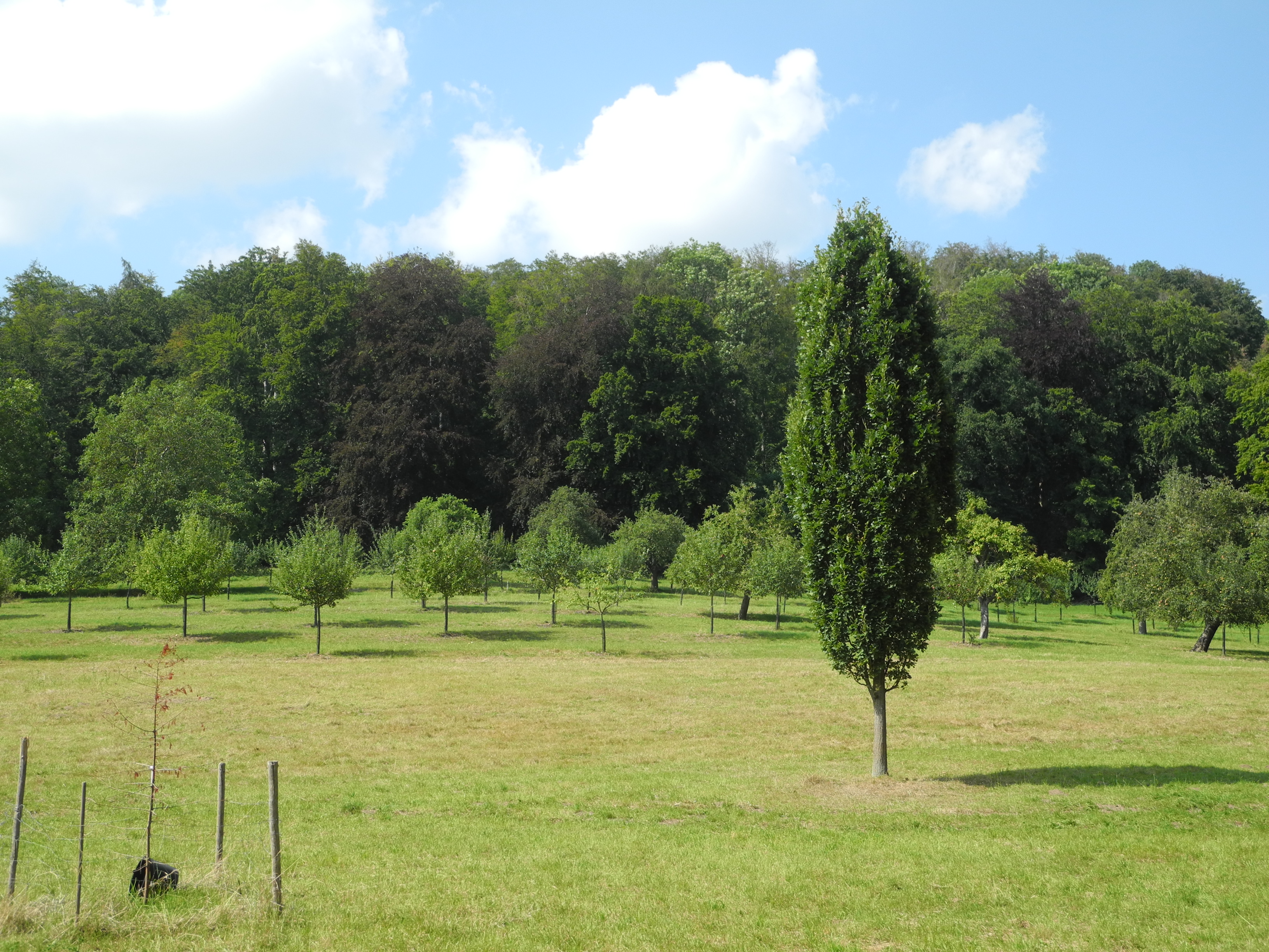 Der historische Tiergarten im Schlosspark Riede, Hessen, Deutschland. Blick von Osten zum Waldrand mit zwei Blutbuchen, am Klauskopf im Westen.